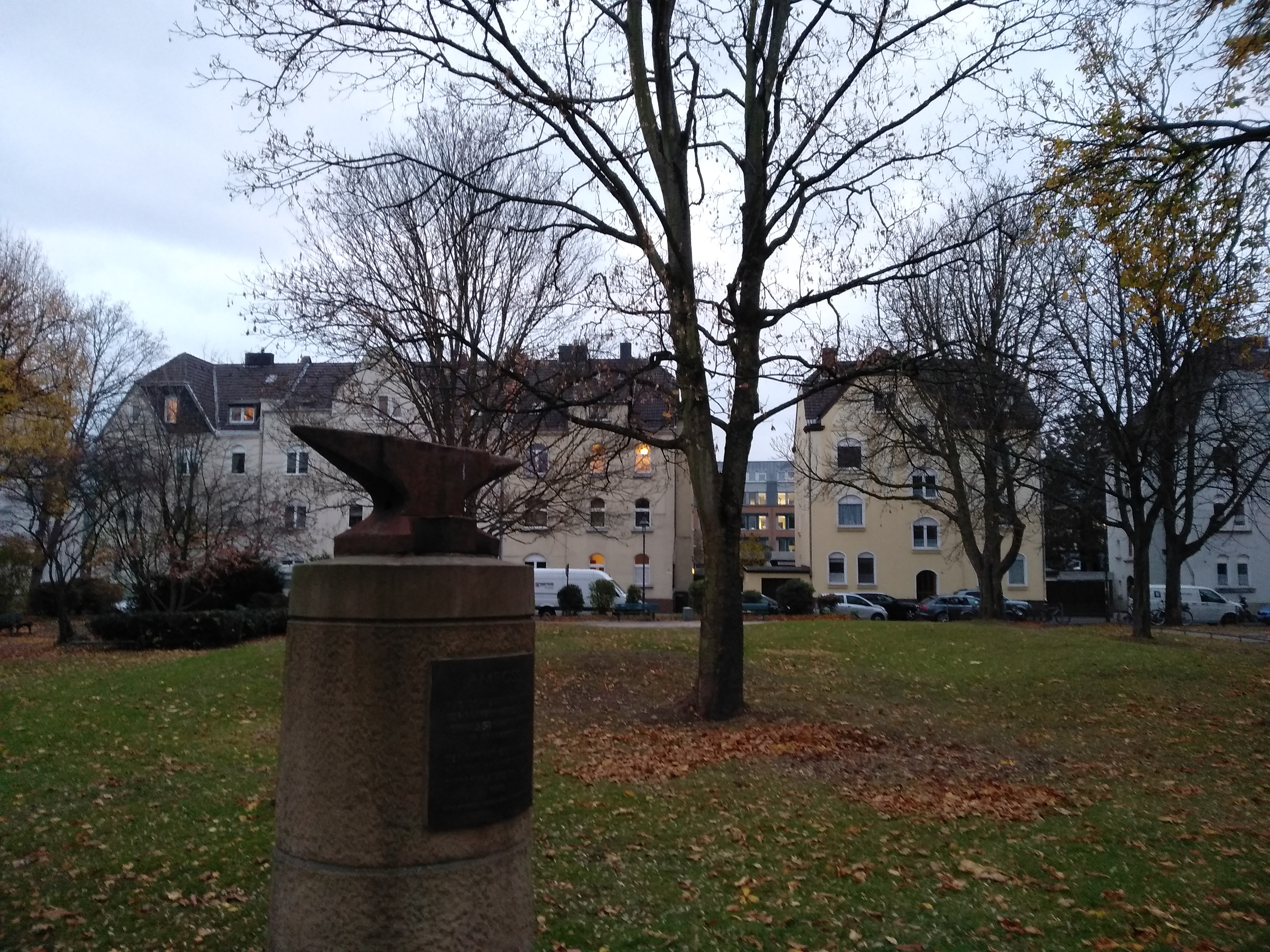 Amboßplatz mit dem Ambossdenkmal in Düsseldorf-Lörick. Im Jahr 1898 wurde das Stahlwerk "Krieger" in Lörick errichtet. Nach der Weltwirtschaftskrise kaufte die Fabrik die Ruhrstahl AG. Im Laufe der Zeit wurde die Ruhrstahl AG in die Thyssen Gießerei umfirmiert. Mit der Schließung des Werkes im Jahr 1982 verschwand die Schwerindustrie aus dem linksrheinischen Stadtteil vollständig. Der Ambossplatz mit dem gleichnamigen Denkmal soll an die Zeit der Schwerindustrie in Düsseldorf-Lörick erinnern. Der Sockel des Denkmales wurde im Jahre 1981 vom Bürgerverein-Lörick gestiftet.